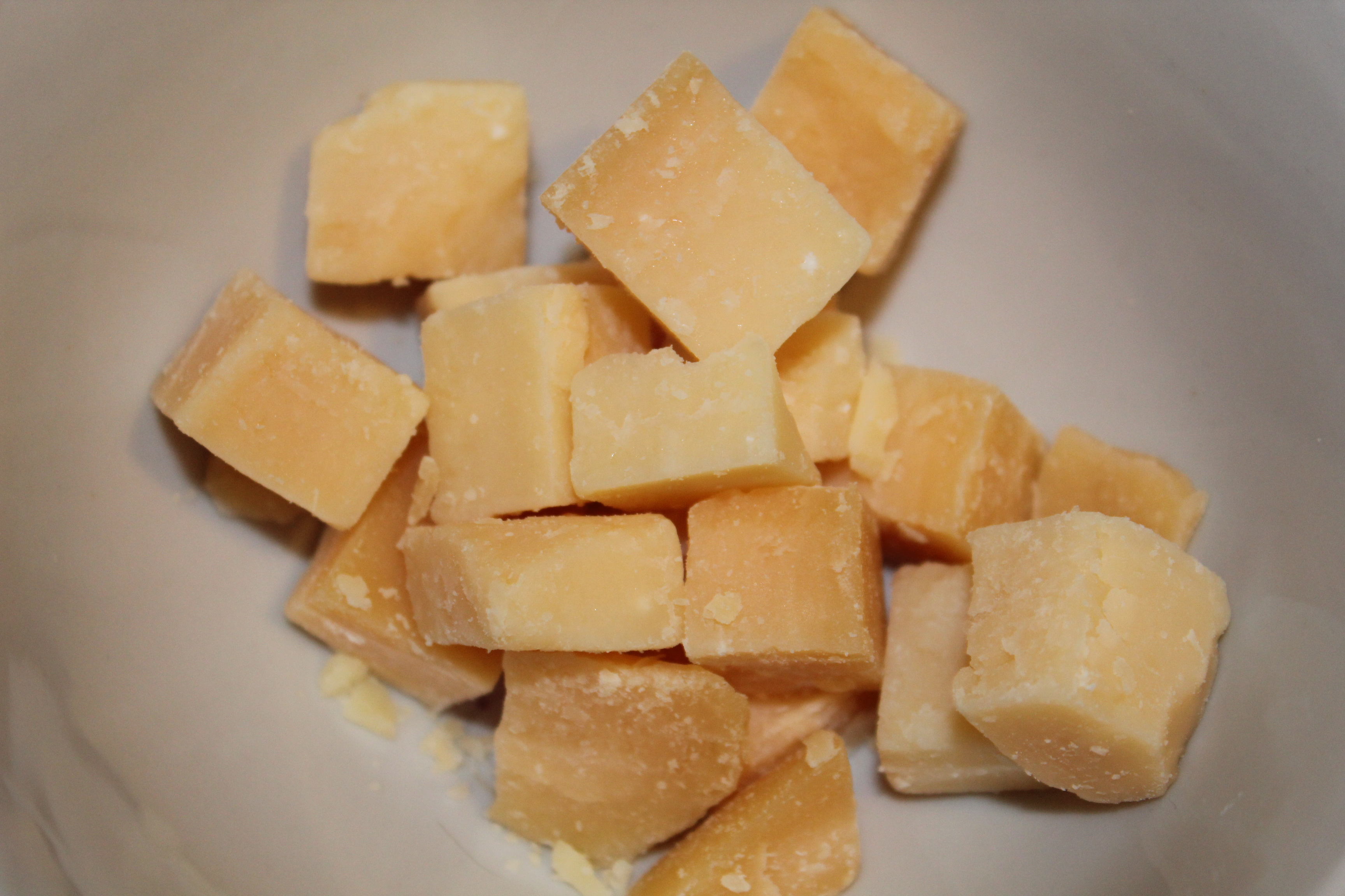 Sūris Džiugas